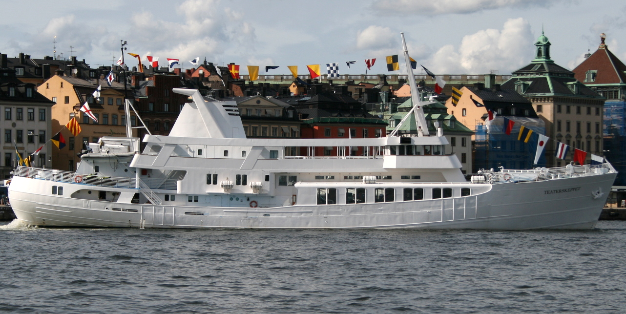 M/S Teaterskeppet i Stockholm